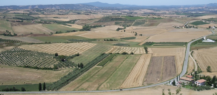 La Val d'Orcia grossetana presso Montenero d'Orcia (GR), Tuscany (Italy)